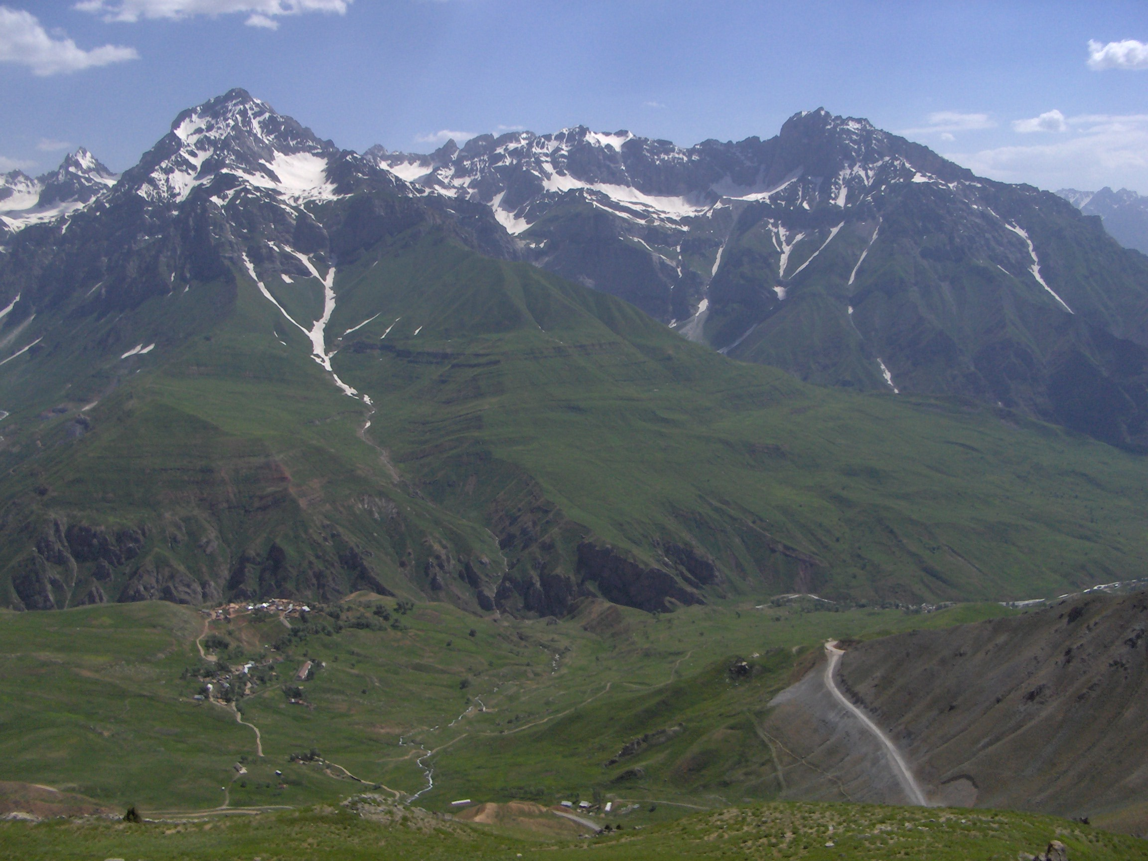 Hight Tajik mountains